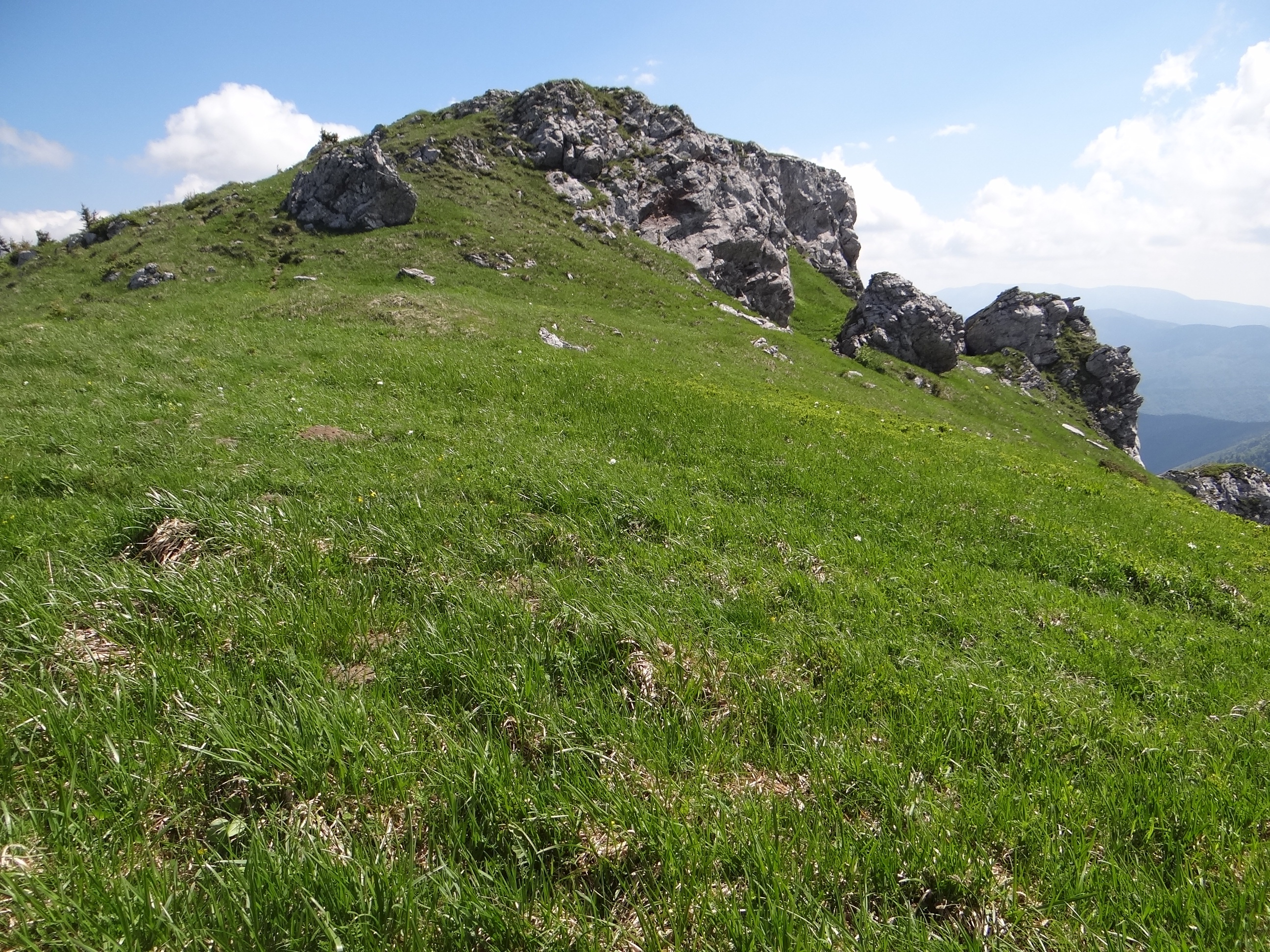 Suchý vrch (Veľká Fatra)